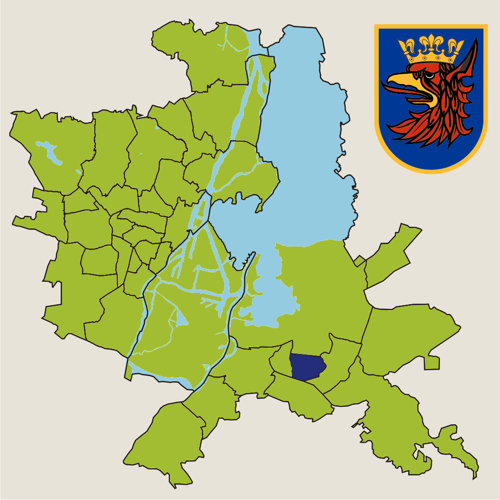 Osiedle "Majowe" w Szczecinie – jednostka pomocnicza miasta w 2010